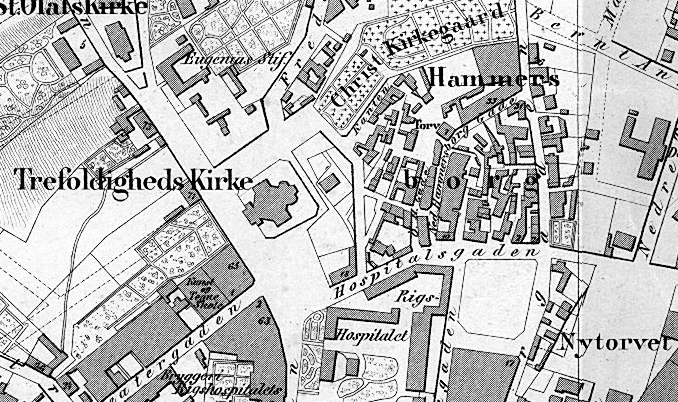 Kart over Hammersborg, 1861.